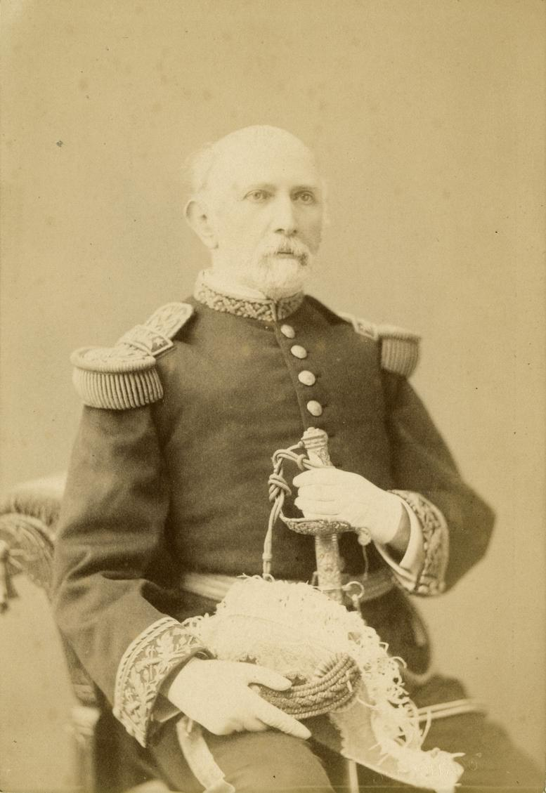 Cornelio Saavedra Rodríguez (Santiago, 1821 - 7 de abril de 1891) fue un militar y político chileno